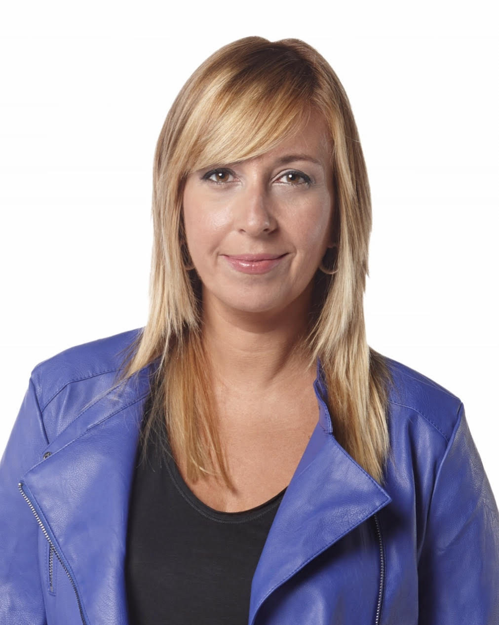 Xantal Llavina periodista de Barcelona, Cataluña